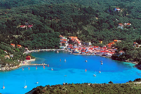 L'immagine raffigurata rappresenta il piccolo paesino greco di Lakka